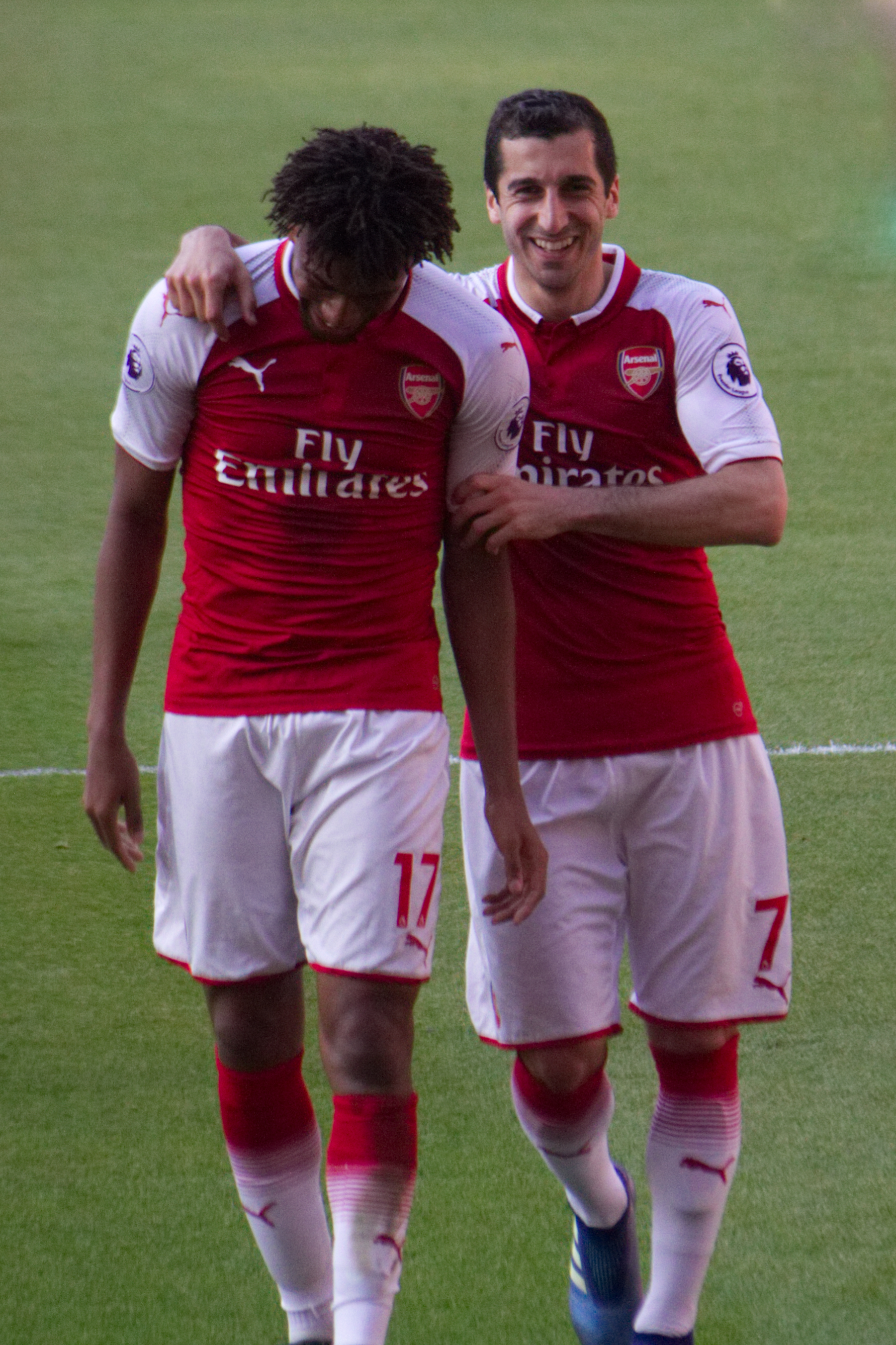 18 Merci Arsène - Celebrating Iwobi's goal